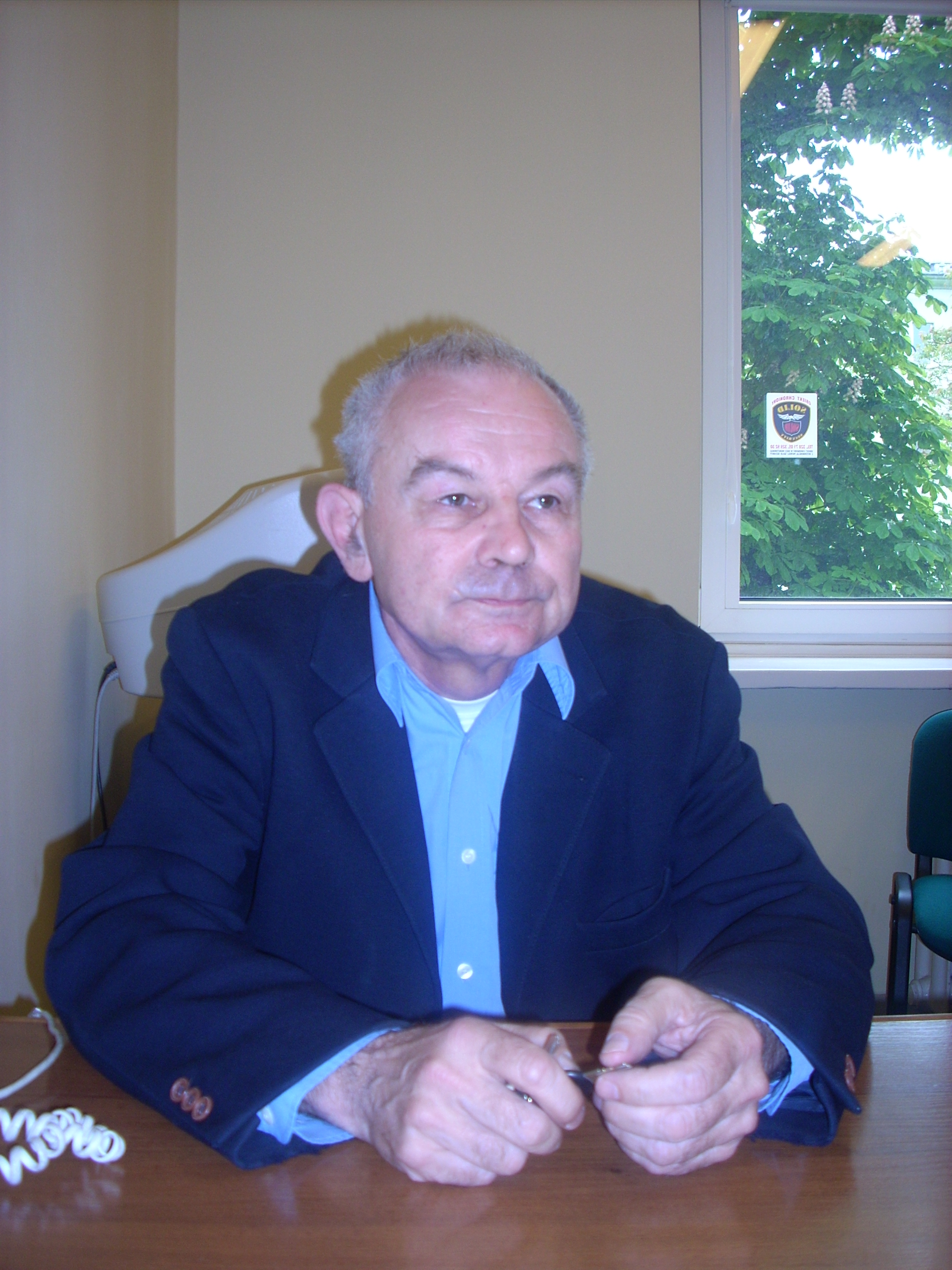 Andrzej Ostrowski